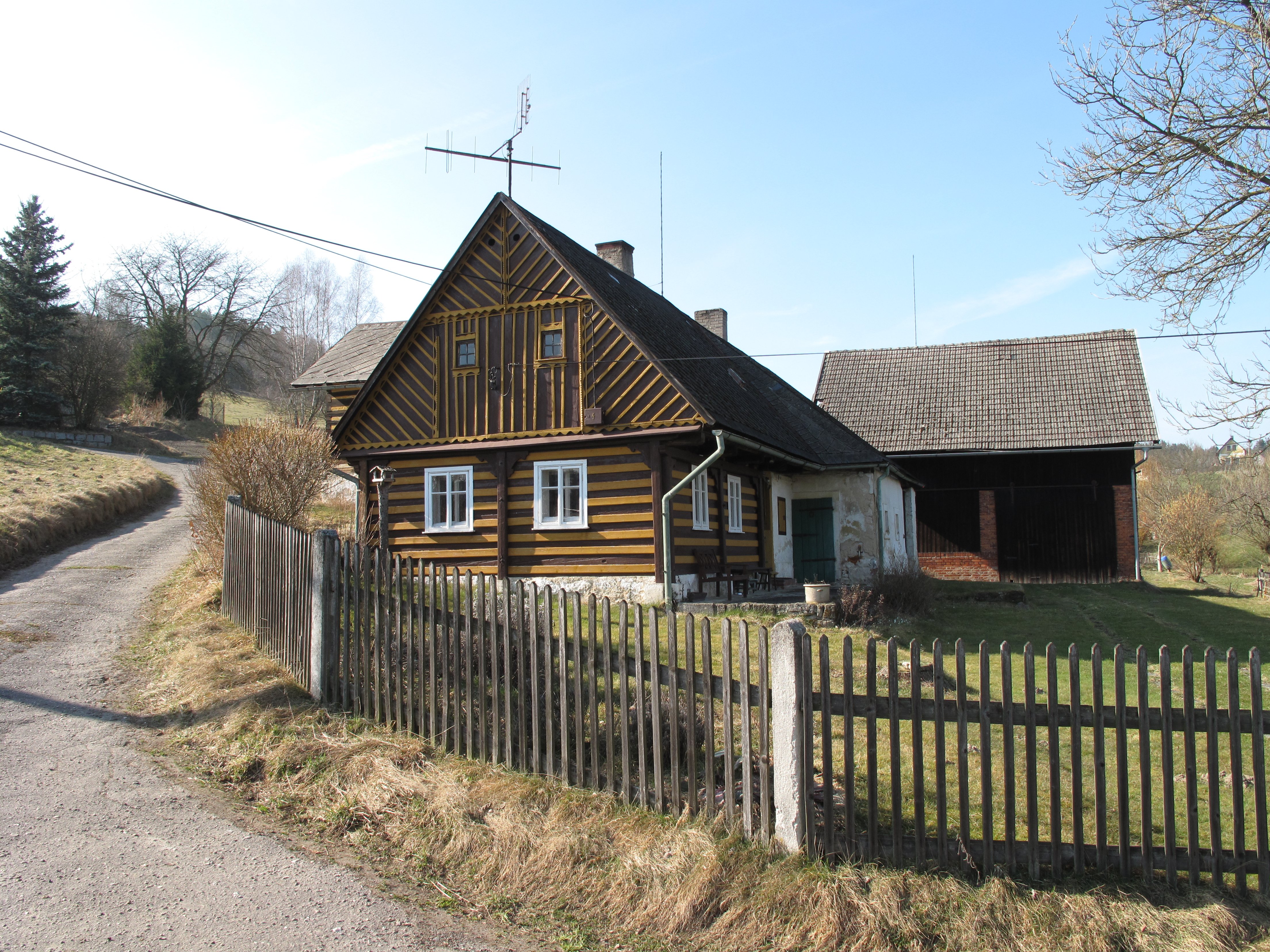 Roubenka v Malém Dubu. Okres Liberec, Česká republika.